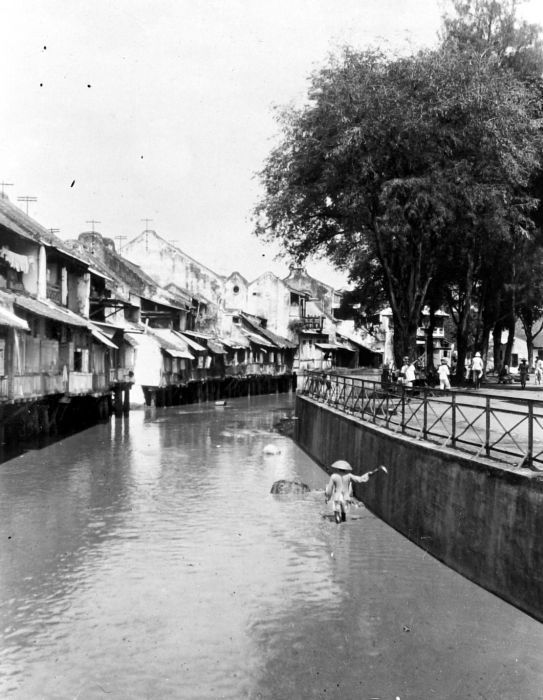 Repronegatief. Kanaal door de Chinese wijk te Semarang